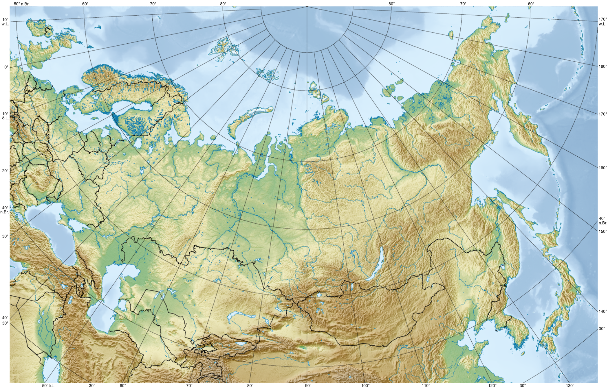 Reliefkarte Russlands